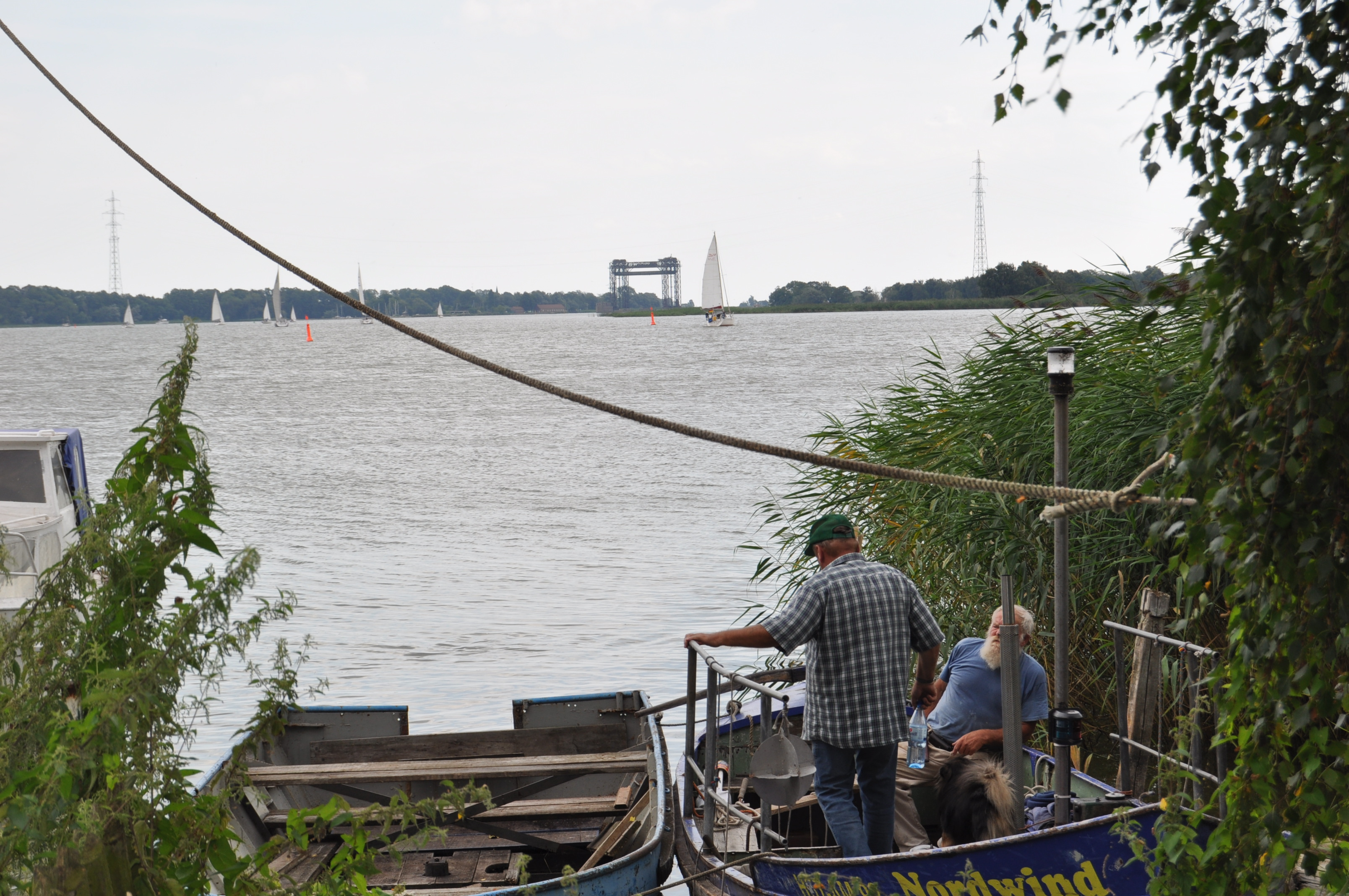 Anklamer Fähre - vorne Fährkahn mit Fährmann - hinten Karniner Brücke und Peenestrom-Freileitungskreuzung Karnin